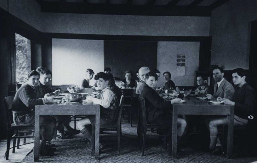 Vermutlich wurde das Bild während des Mittagessens aufgenommen. Es zeigt die jüdischen Schülerinnen und Schüler, die seit dem 1. September 1941 nicht mehr im Hauptgebäude von Schloss Eerde leben durften.